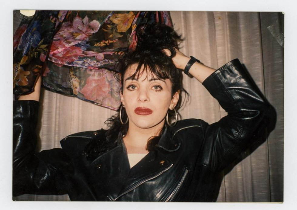 La reconocida activista argentina LGBT Claudia Pía Baudracco en los años ochenta. Archivo de la Memoria Trans.